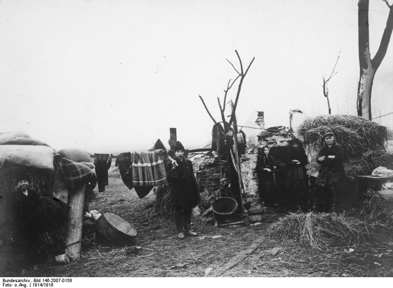 Die letzten Einwohner von Bednary, die in dem Keller ihres zerstörten Hauses eine Zufluchtsstätte fanden. Die Frauen tragen sehr bunte, rot, gelb, blau, gestreifte Röcke, - am Sonntag mehrere verschiedene - bis vier- übereinander, jeder sichtbar. (vergl. nächste Seite)